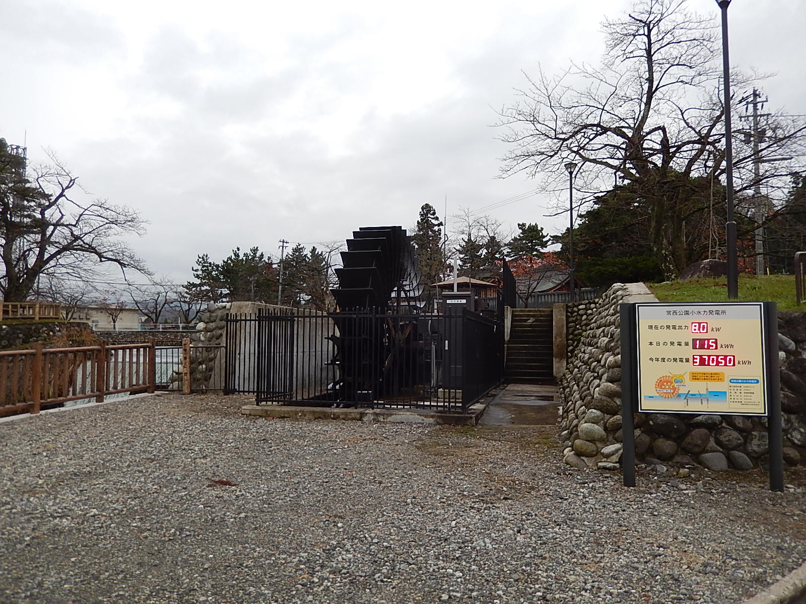 富山市の常西用水に設置された小水力発電用の水車 最寄りは富山地鉄上滝線大川寺駅